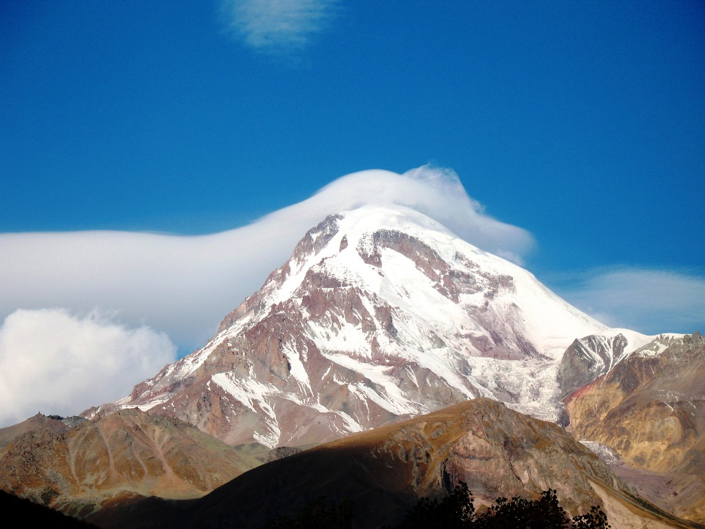 Kazbek